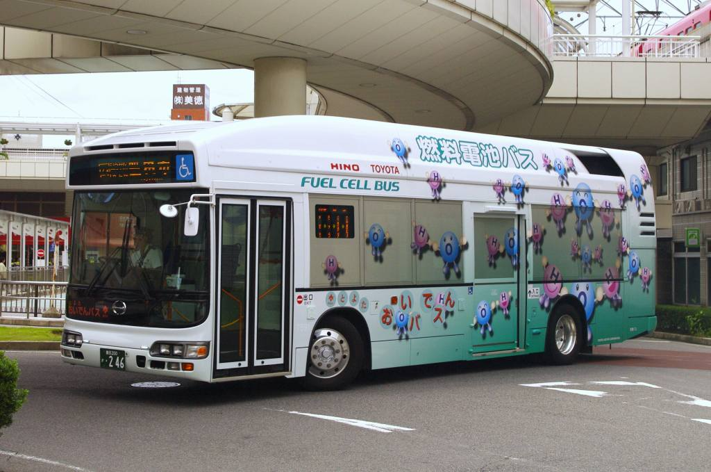 トヨタ自動車貸与の燃料電池バス